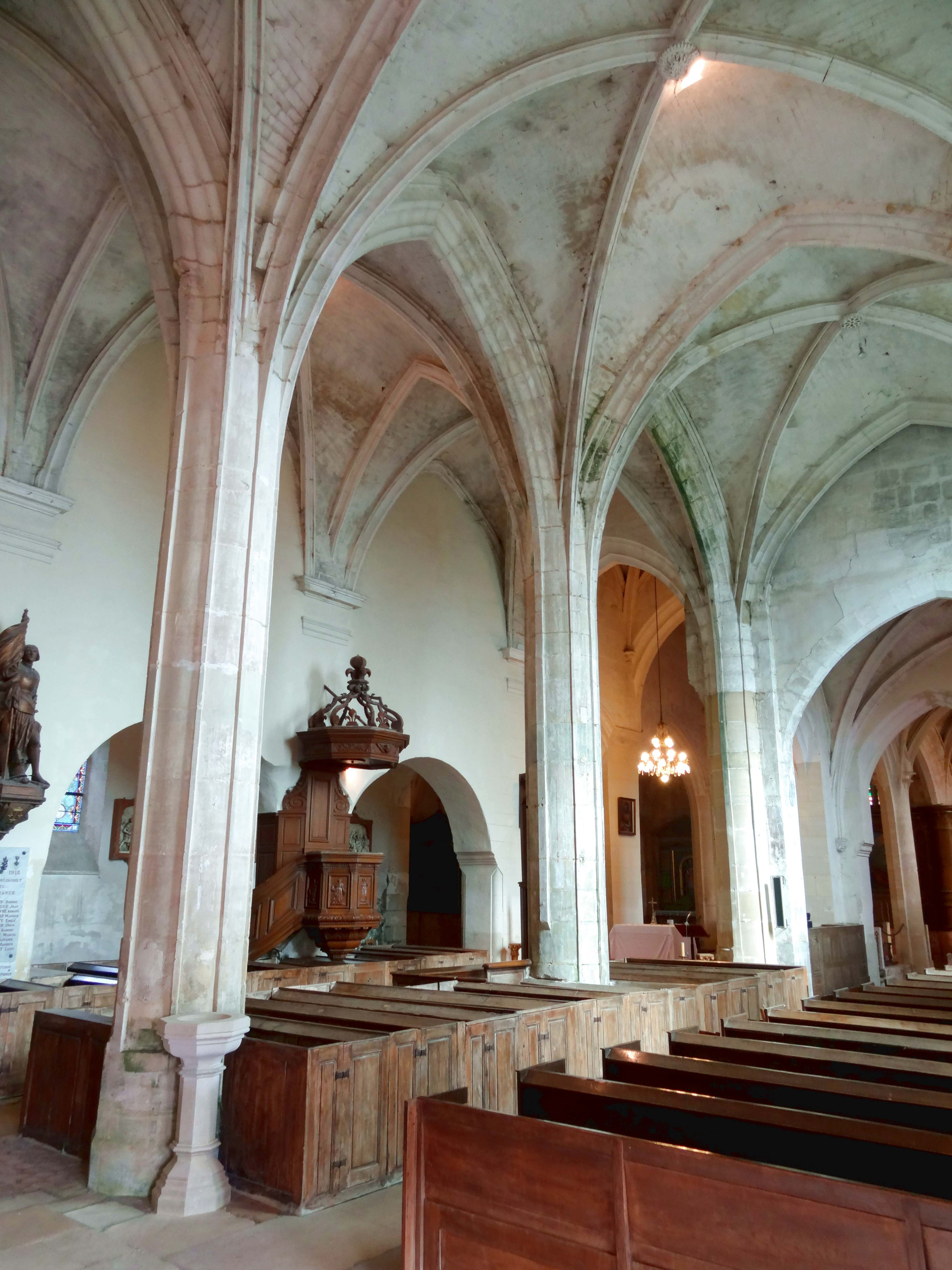 Intérieur de l'église - voir titre.